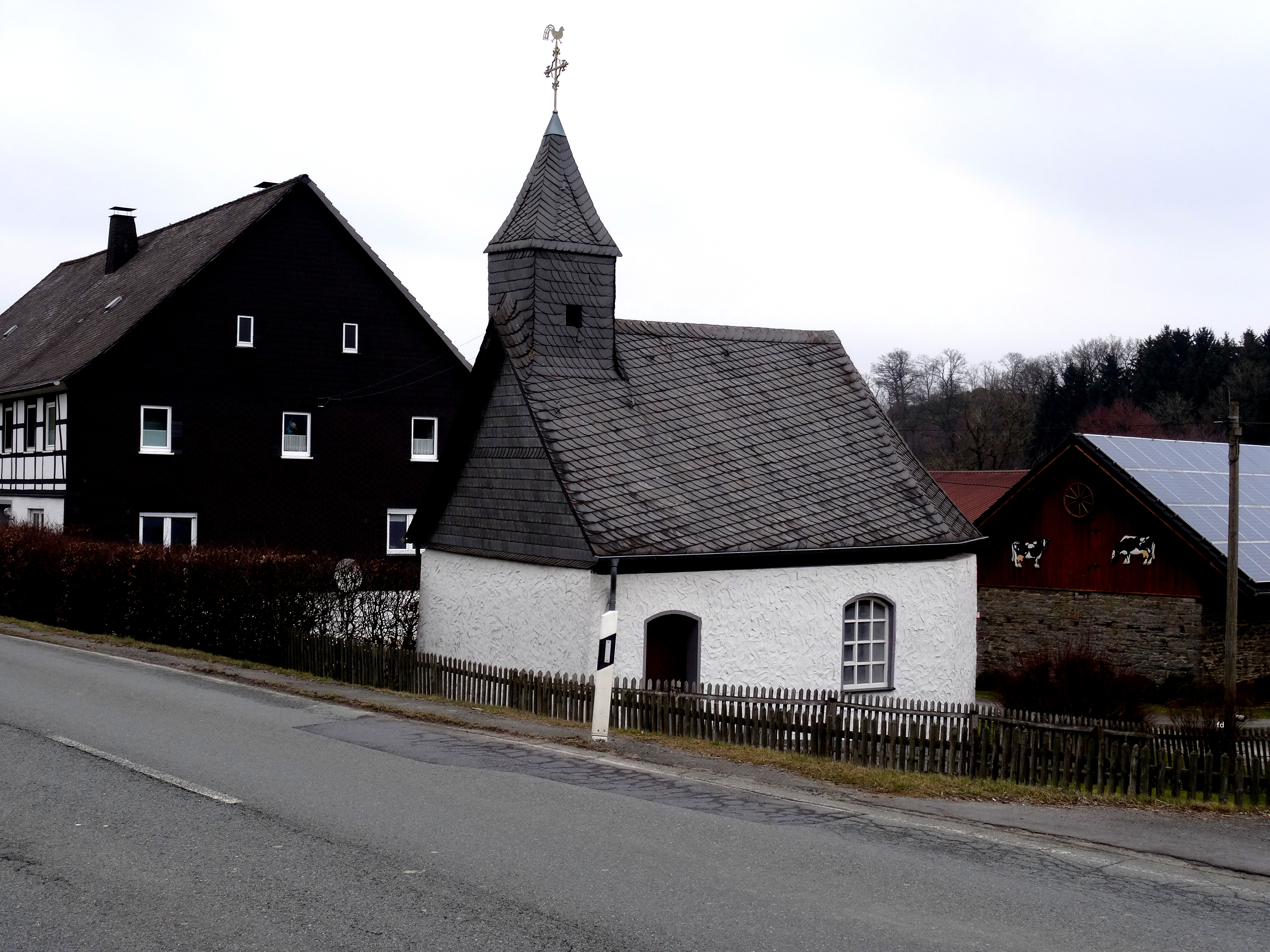 Denkmalgeschützte katholische Kapelle in Nichtinghausen, Ortsteil von Eslohe.